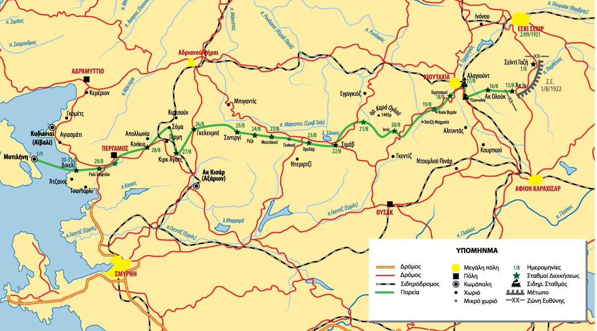 Χάρτης πορείας υποχώρησης Ανεξαρτήτου Μεραρχίας